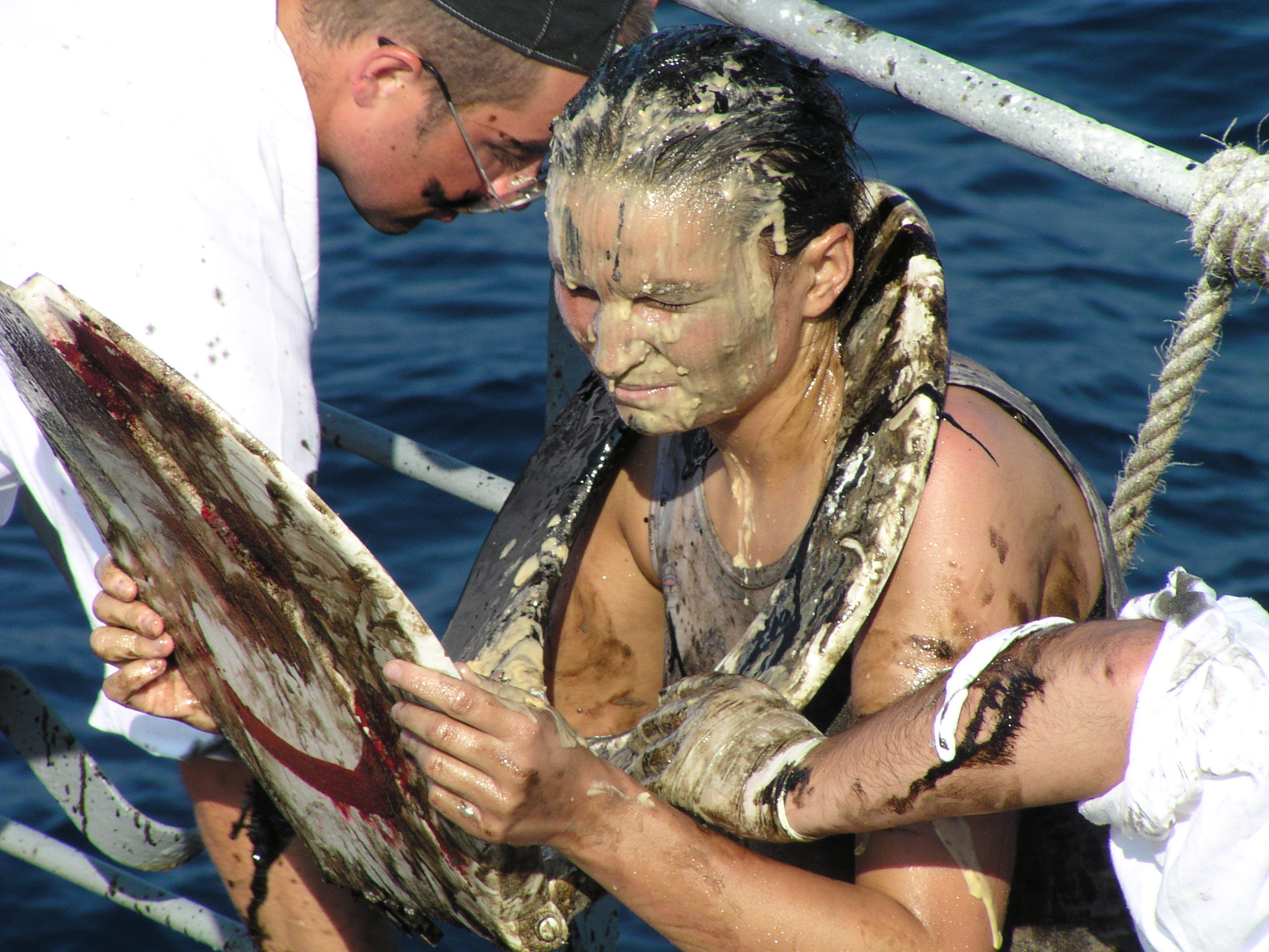 Chrzest morski na ORP Wodnik